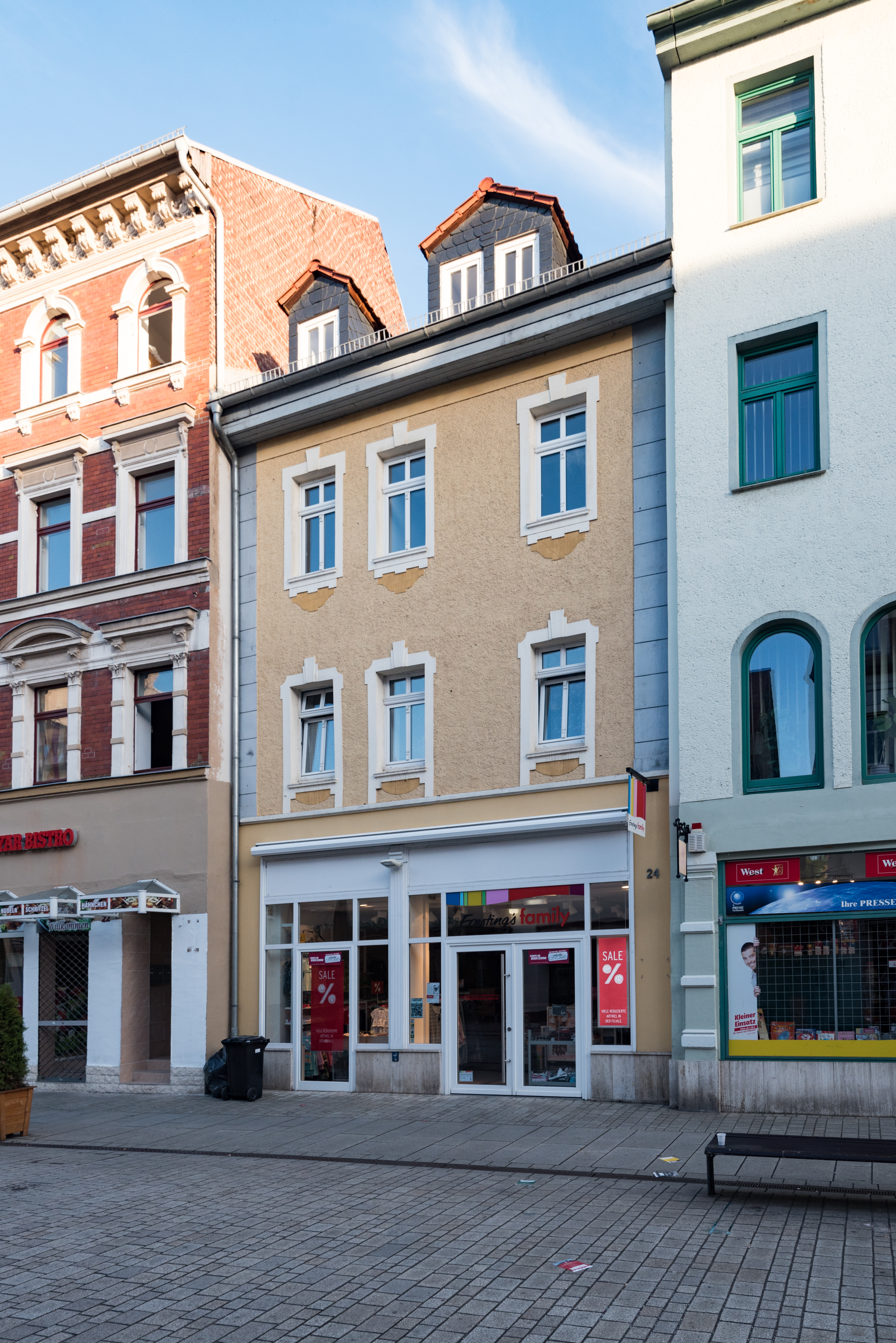 Weißenfels, Jüdenstraße 24